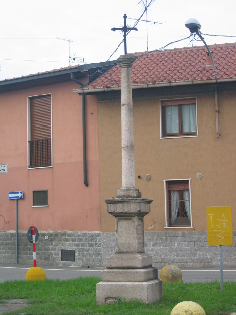 Colonna votiva eretta durante la peste del 1576